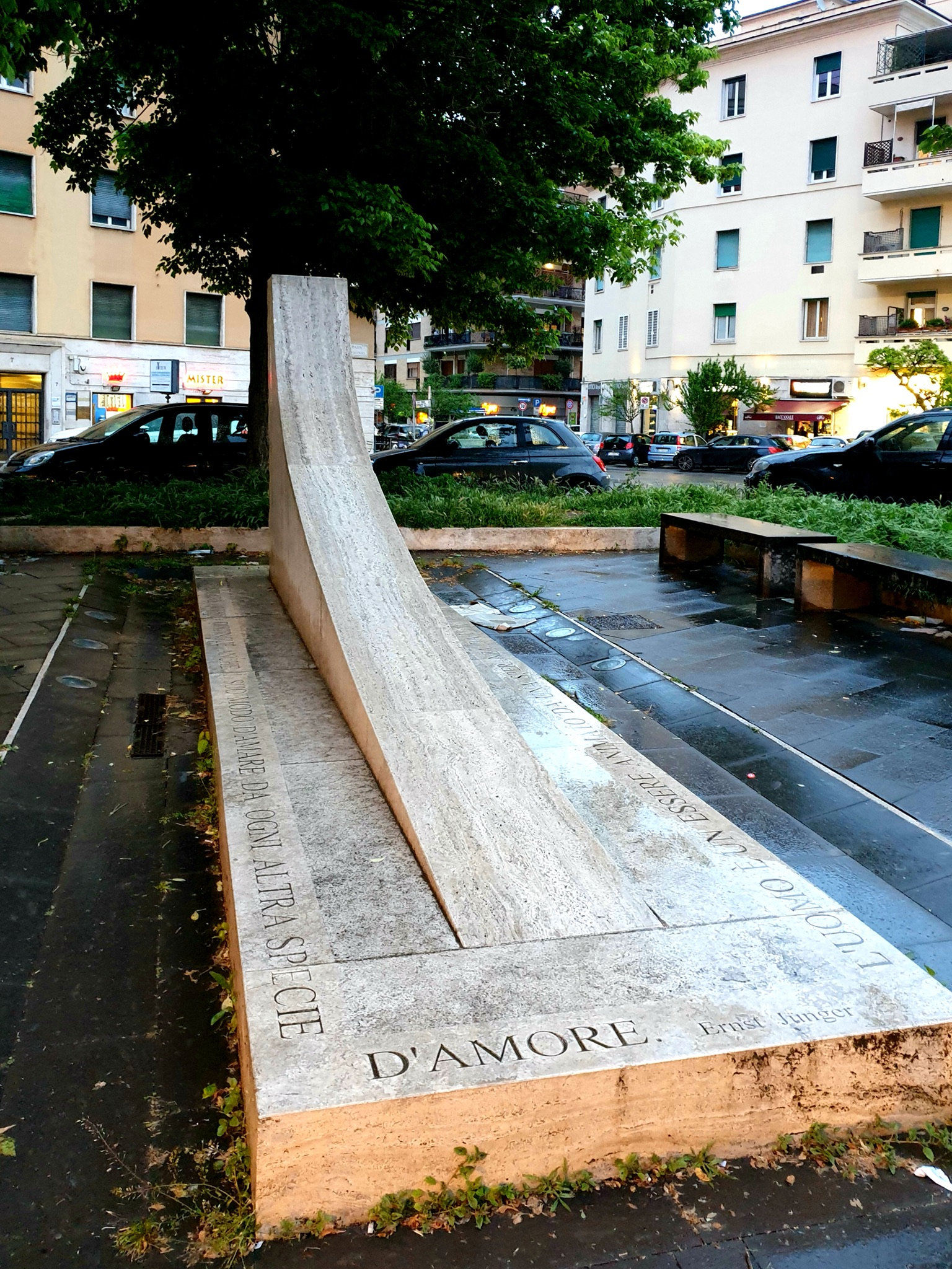 Lapide a Francesco Cecchin a Roma, Piazza Vescovio, inaugurata nel 2011